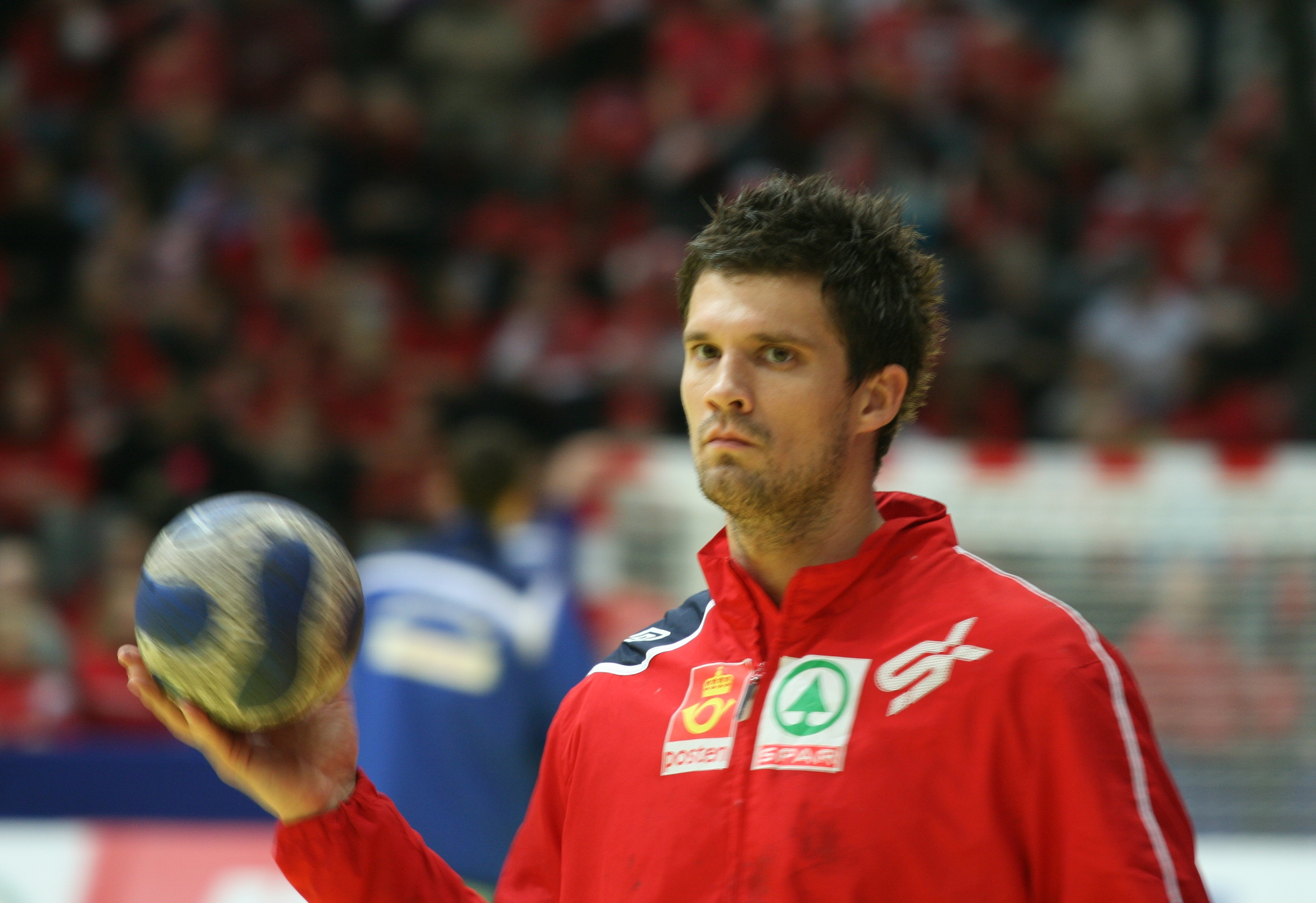 Kristian Kjelling, Norwegian handballer, in Stavanger